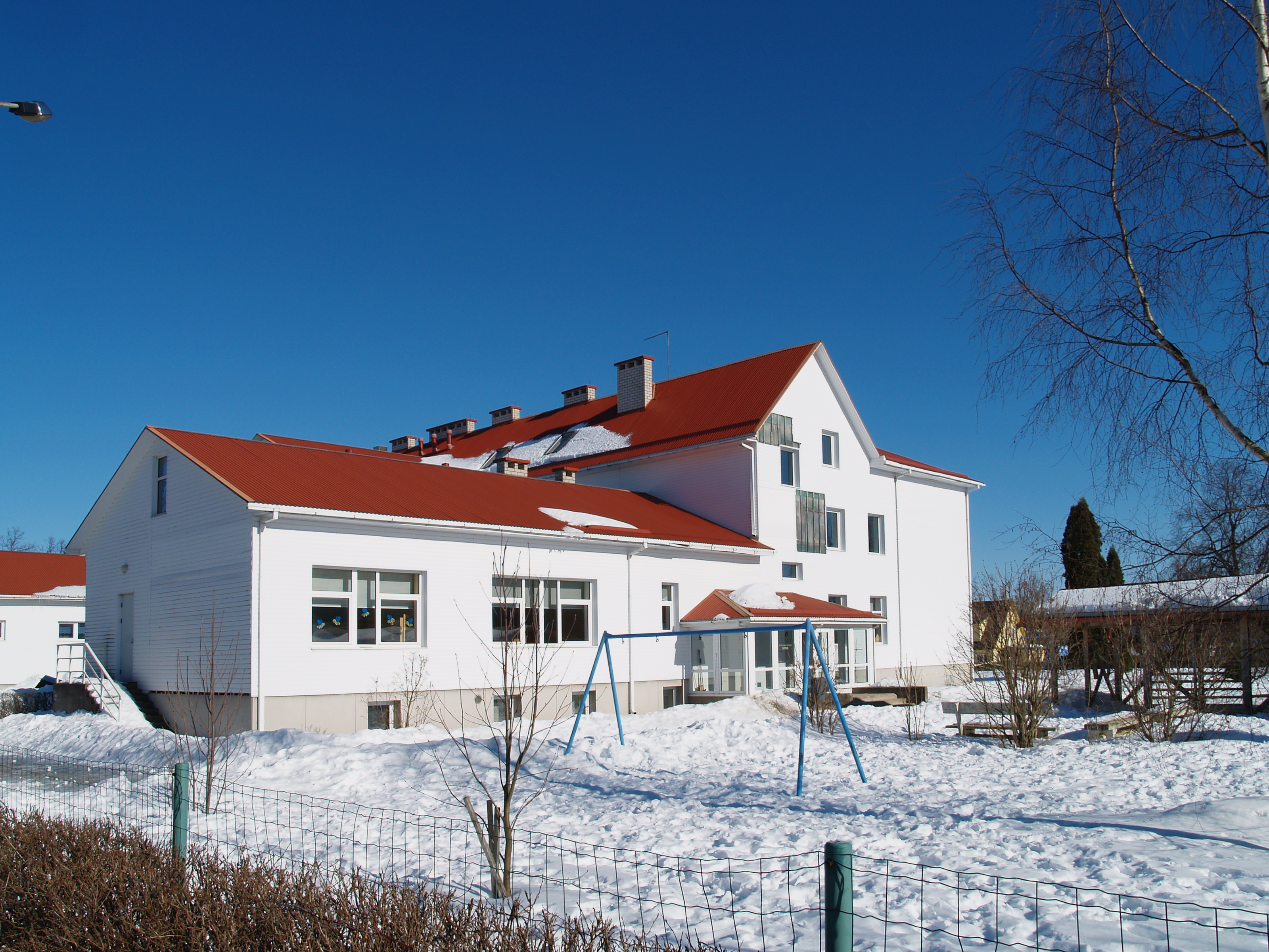 Suure-Jaani vallamaja